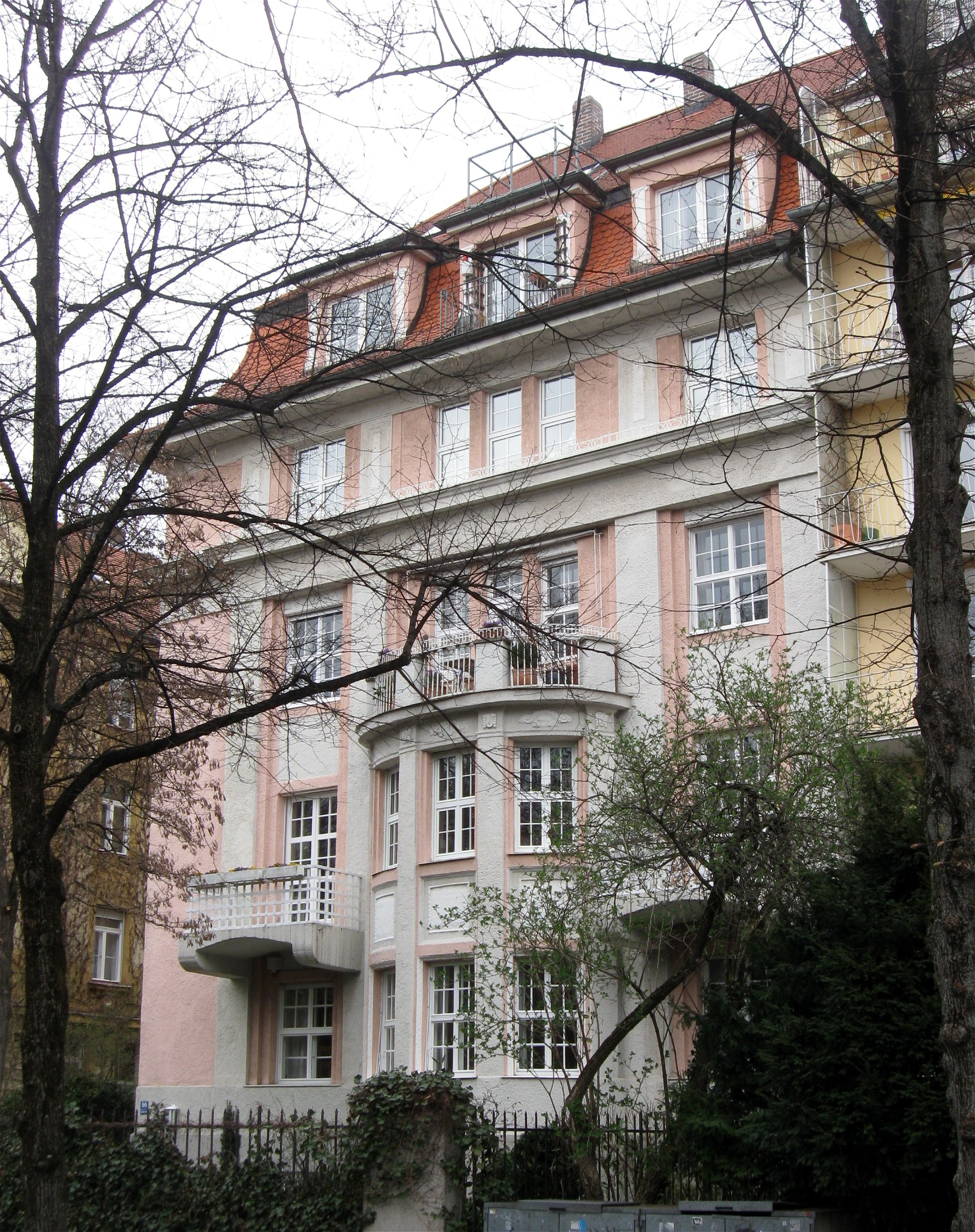 Adalbertstraße 96; Mietshaus, klassizistischer Jugendstil, mit halbrundem Erkervorbau, 1911 von Max Neumann.